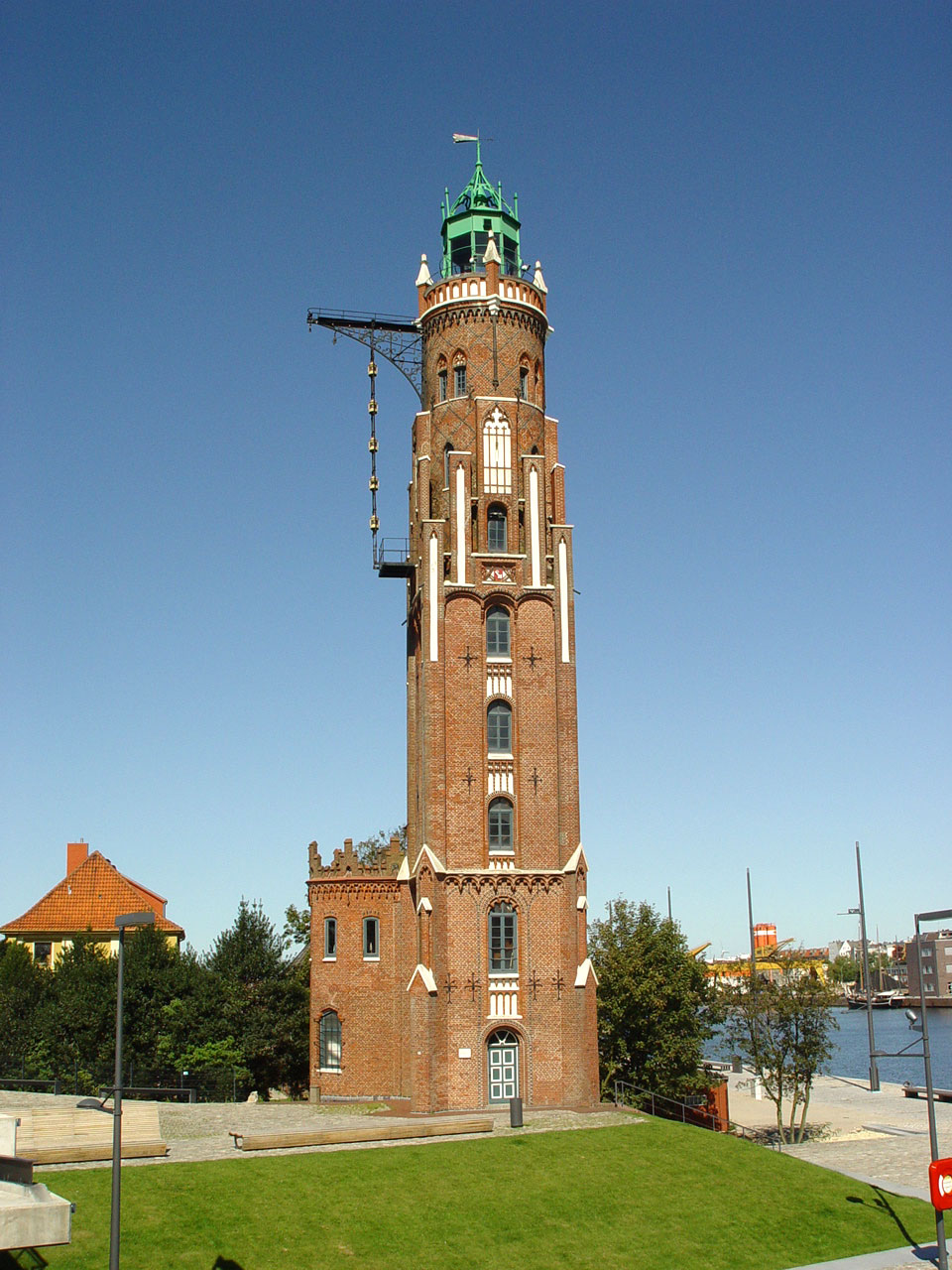 Bremerhaven. Großer Leuchtturm ("Loschenturm") von 1854. Erbaut von dem Bremer Architekten Simon Loschen im Stil der norddeutschen Backsteingotik. Der Turm ist ca. 39m hoch und noch heute als "Bremerhaven Oberfeuer" in Betrieb. Das abgebildete Objekt ist ein geschütztes Kulturdenkmal in der Freien Hansestadt Bremen, mit der Nr. 1546 beim Landesamt für Denkmalpflege registriert.